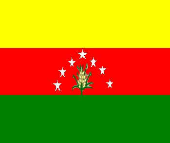 Bandera del municipio Piar, estado Monagas, Venezuela